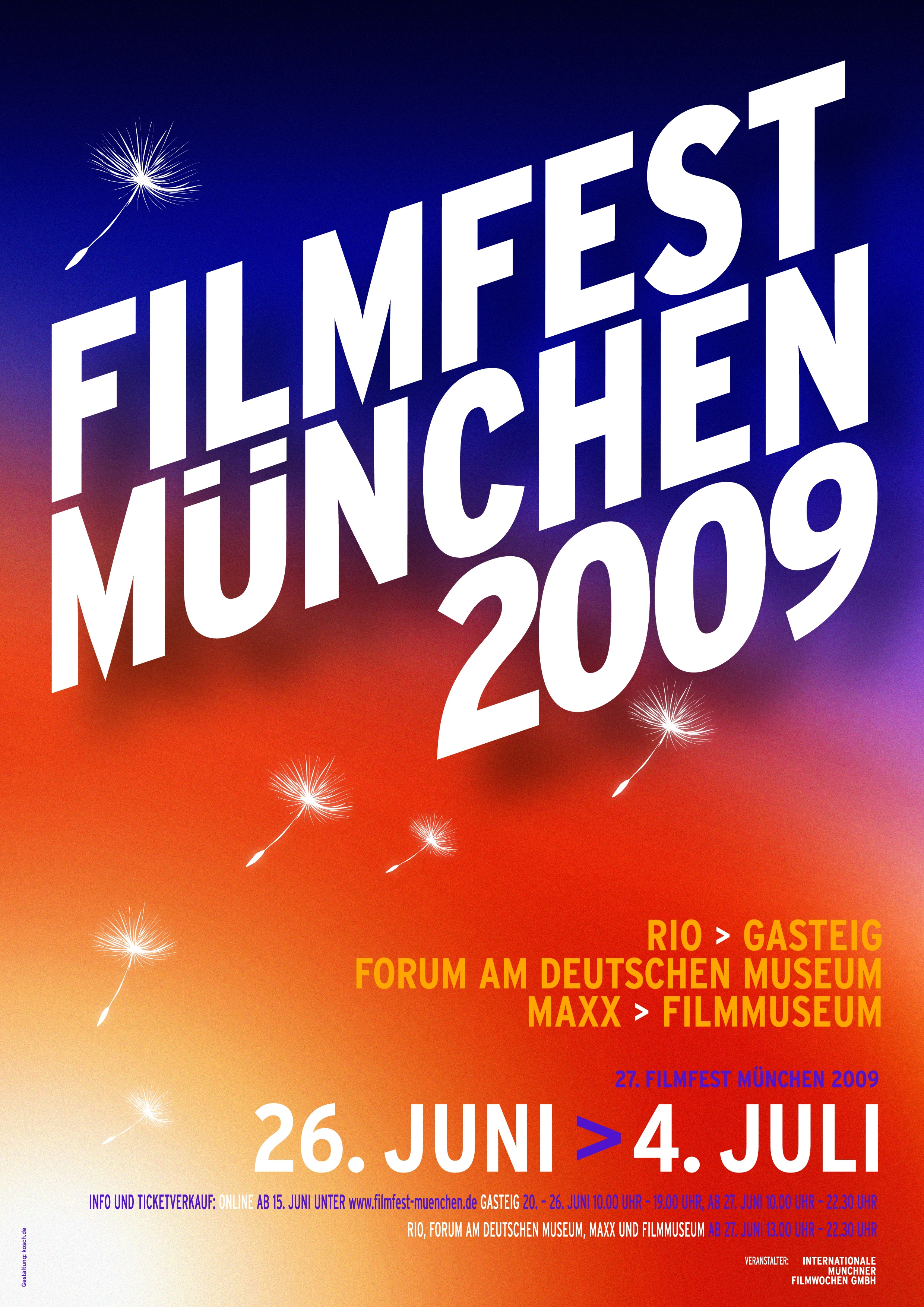 Filmfest Plakat 2009